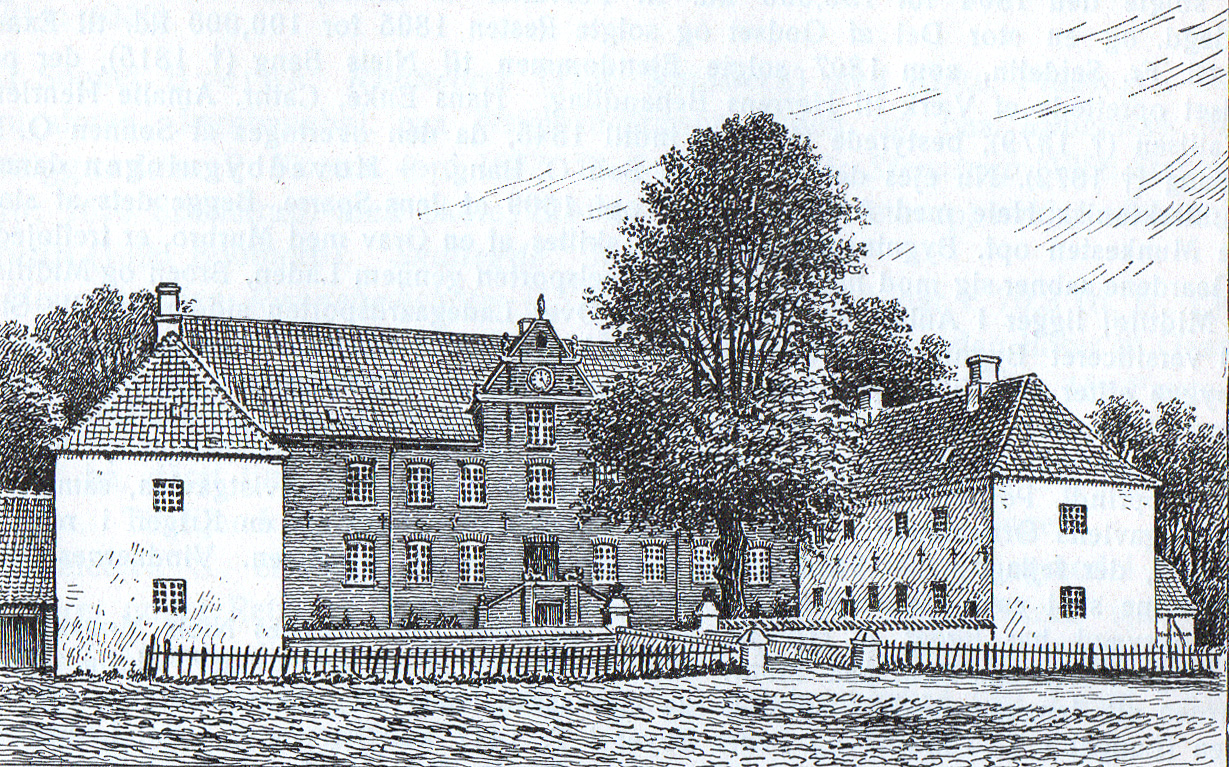 Sparresholm er et gods i Toksværd Sogn i Næstved Kommune (tidligere Præstø Amt) på Sjælland, Denmark.